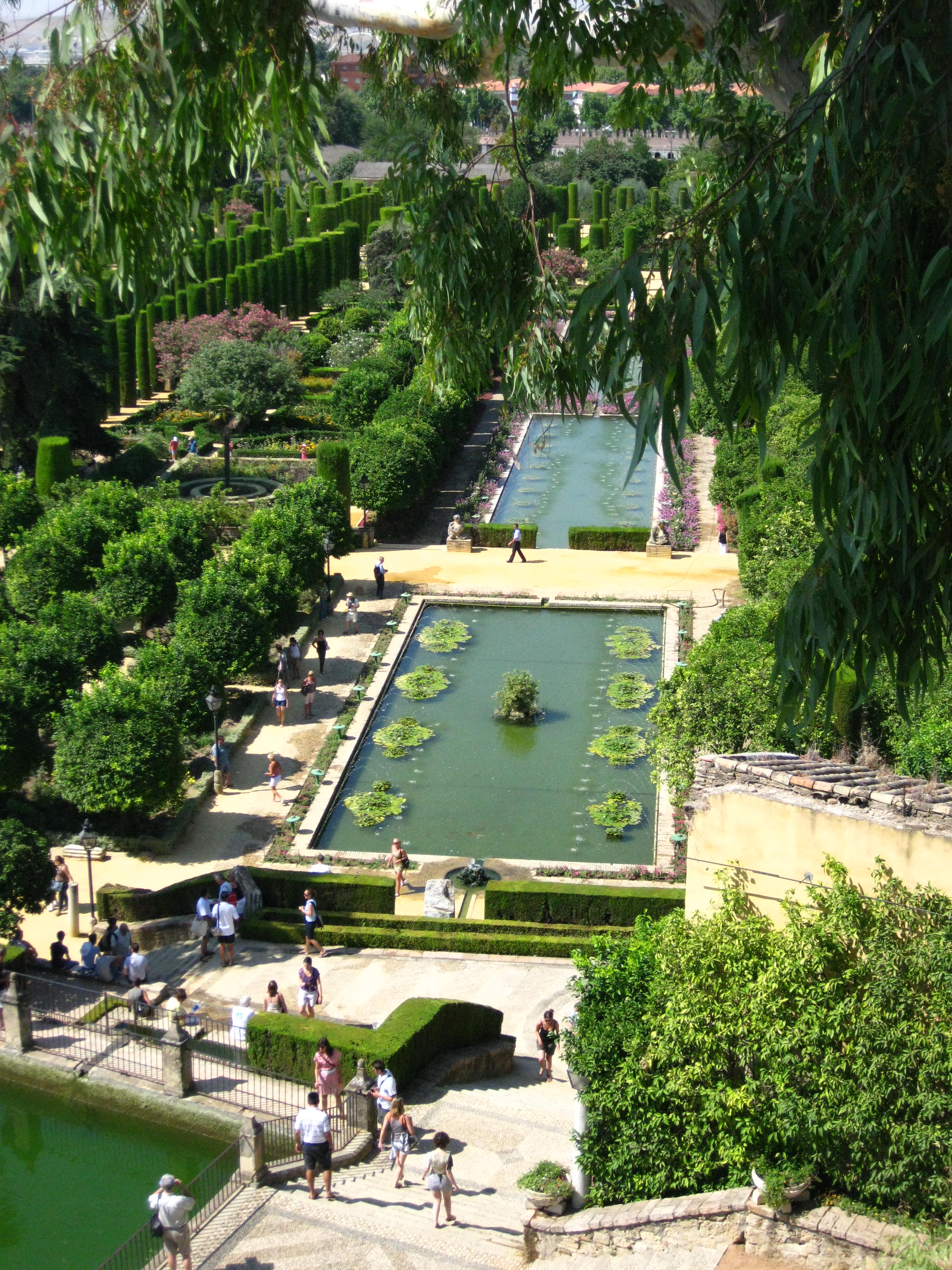 Jardins et bassins de l'Alcazar mudejar de Cordoue